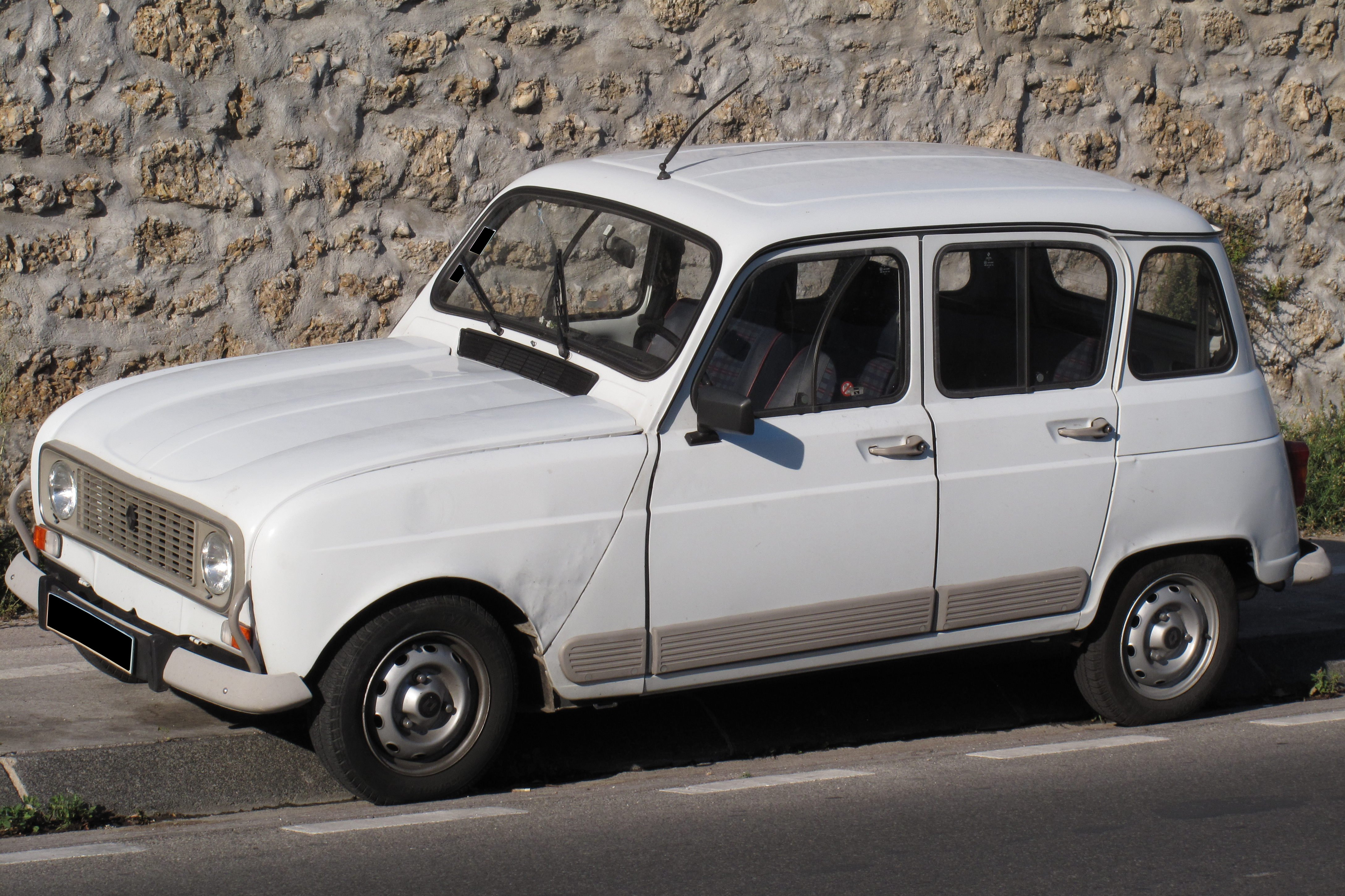 Renault 4